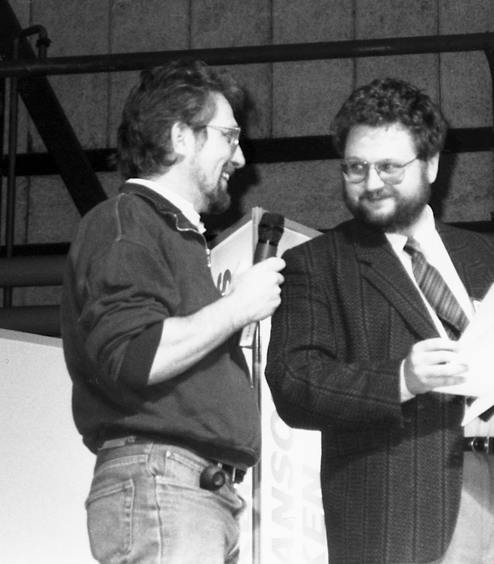 Horst Schröder och Daniel Atterbom på scenen under Serie-Expo -91 i Stockholm. Sannolikt handlar det om Thud – Serieläsarnas pris 1991.